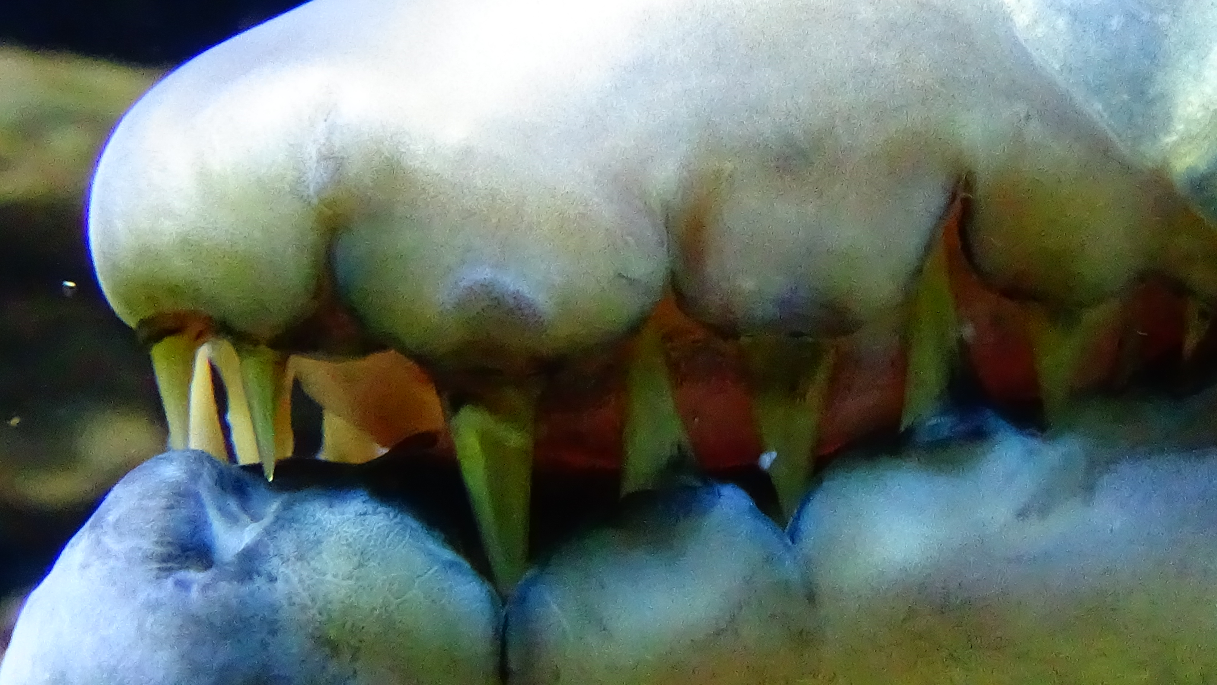 Hydrocynus goliath - Poisson-chien - Aquarium tropical du Palais de la porte Dorée, Paris, ile de France, France - 12/2014